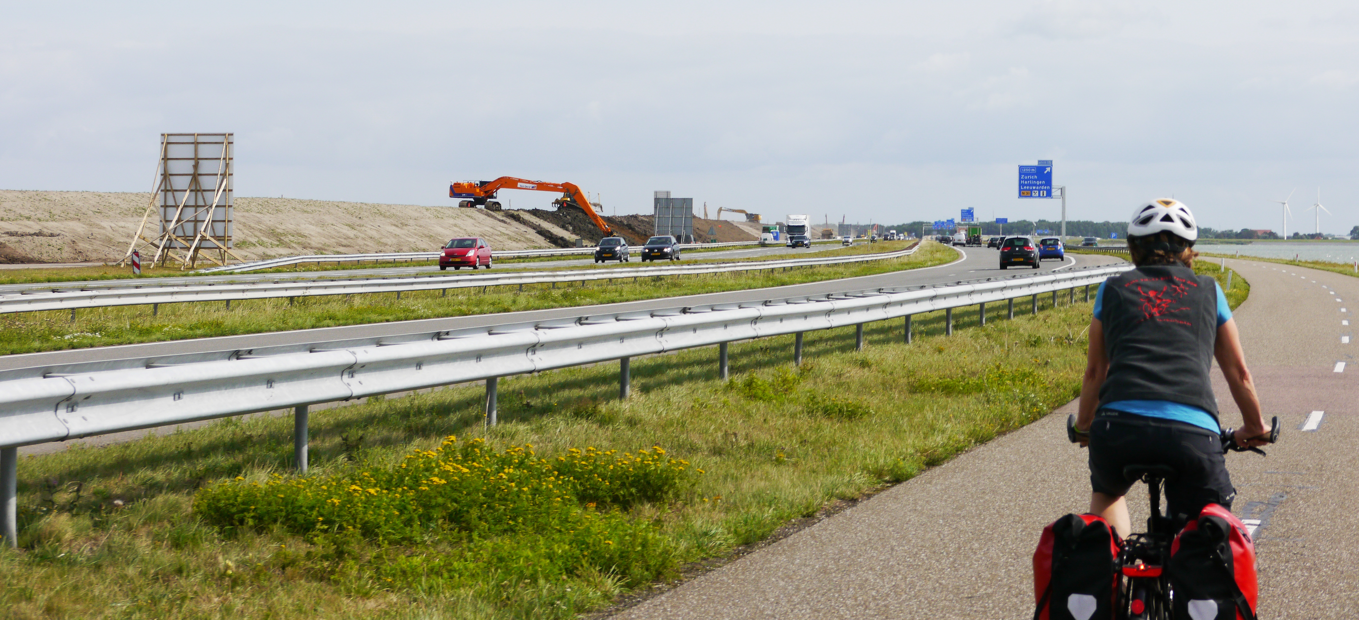 Afsluitdijk (Abschlussdeich zum IJselmeer), Bauarbeiten 2019. Der Deich (Damm) wird über die gesamte Länge überflutungssicher gemacht und dabei an einigen Stellen um 2 Meter erhöht.